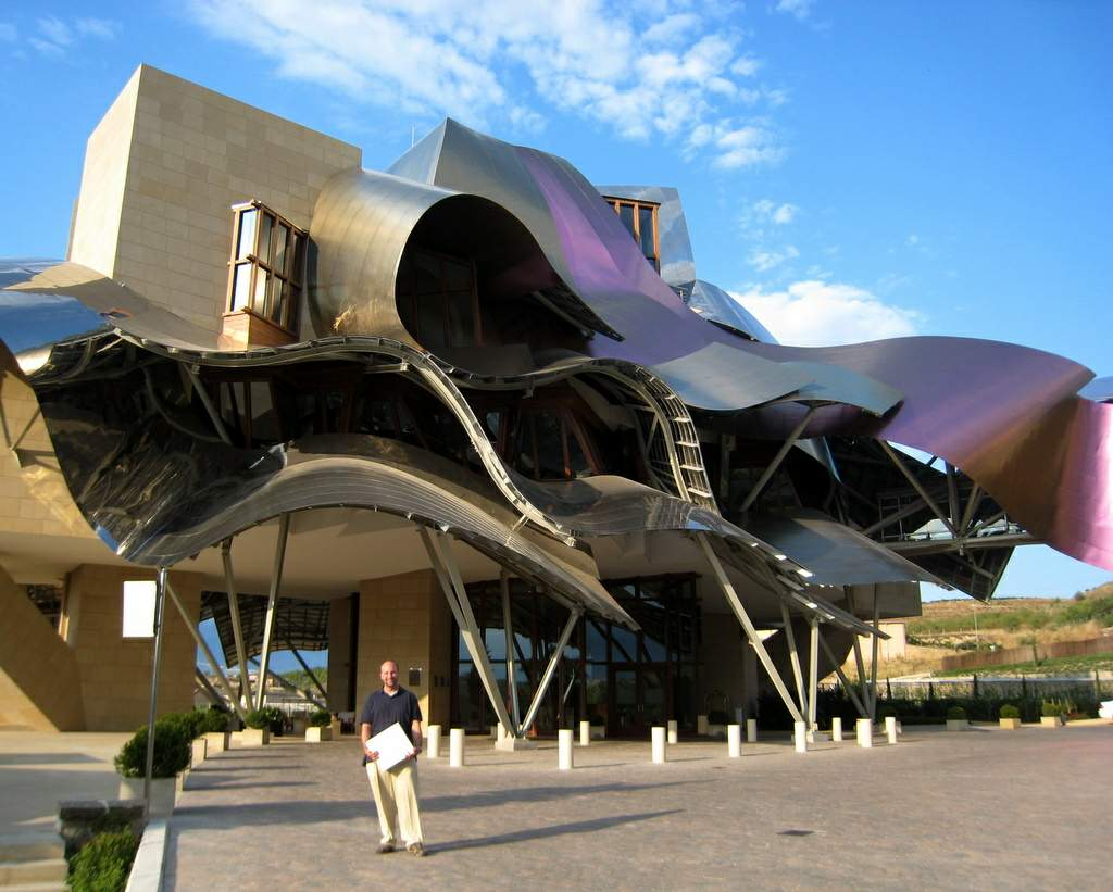 Elciego: Ciudad del Vino-Marqués de Riscal